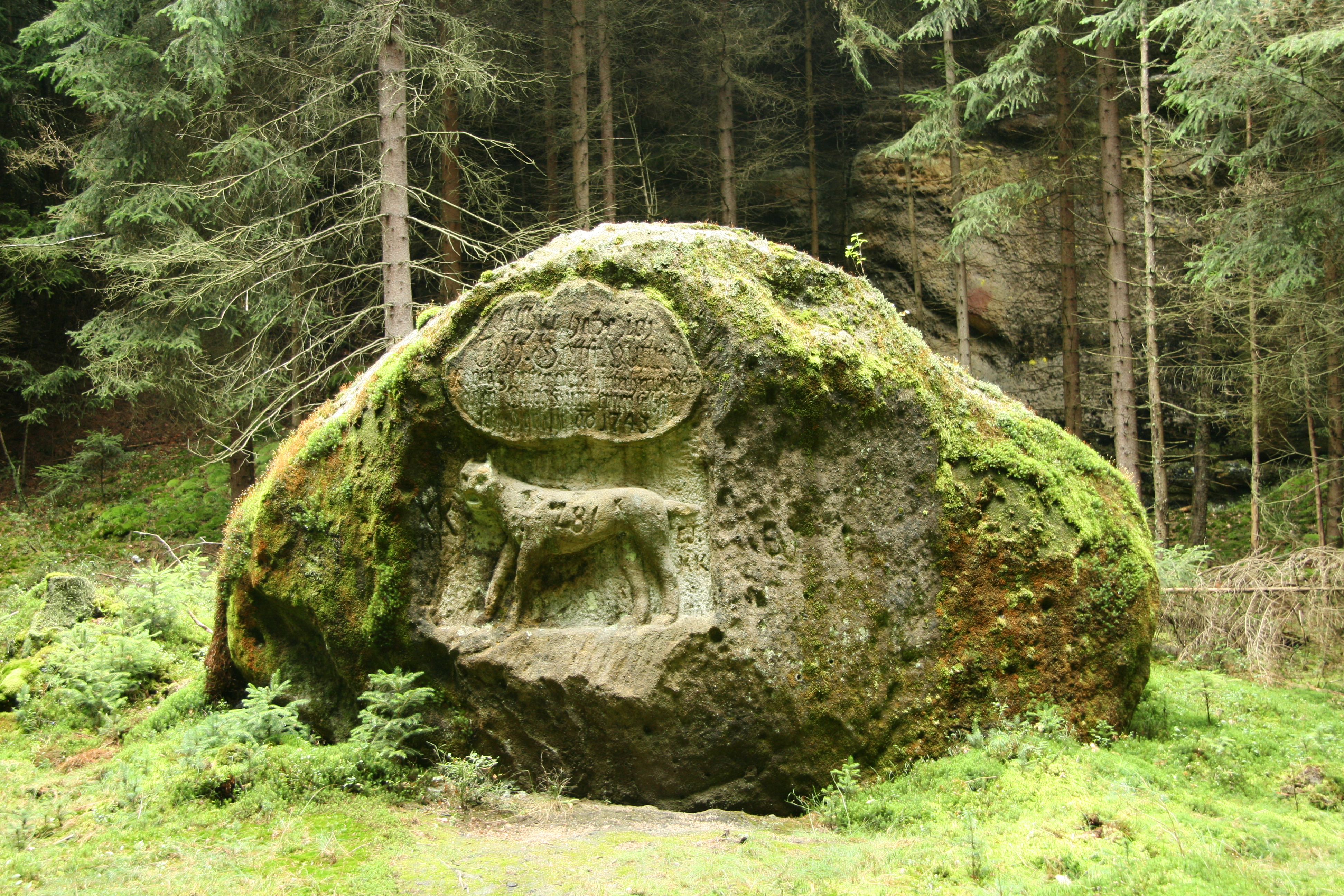 Luchsstein im Kirnitzschtal, Elbsandsteingebirge